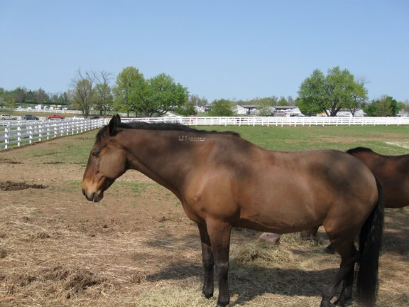 കെന്റക്കി ഹോഴ്സ് പാർക്ക്